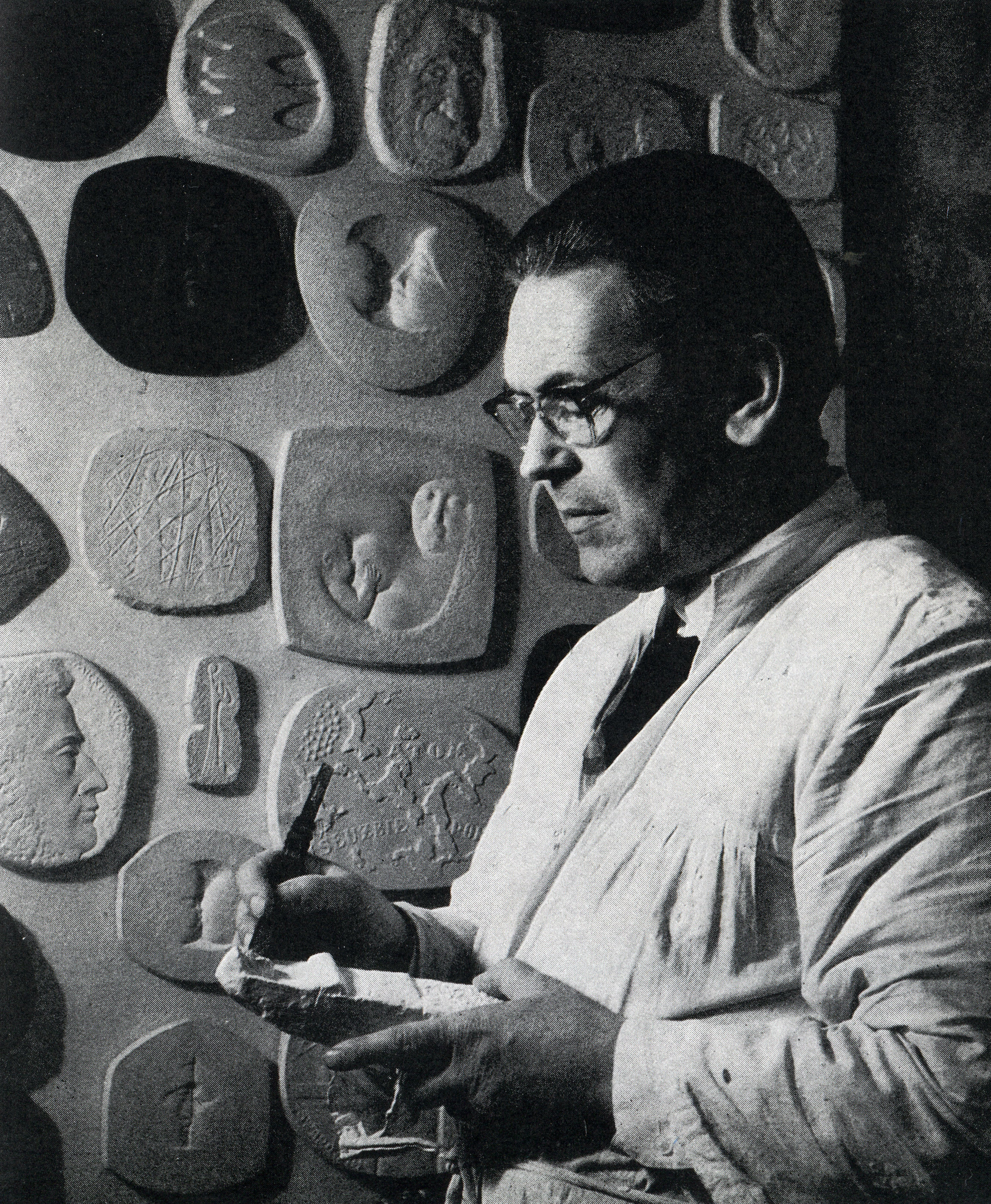 Zdjęcie w swojej pracowni